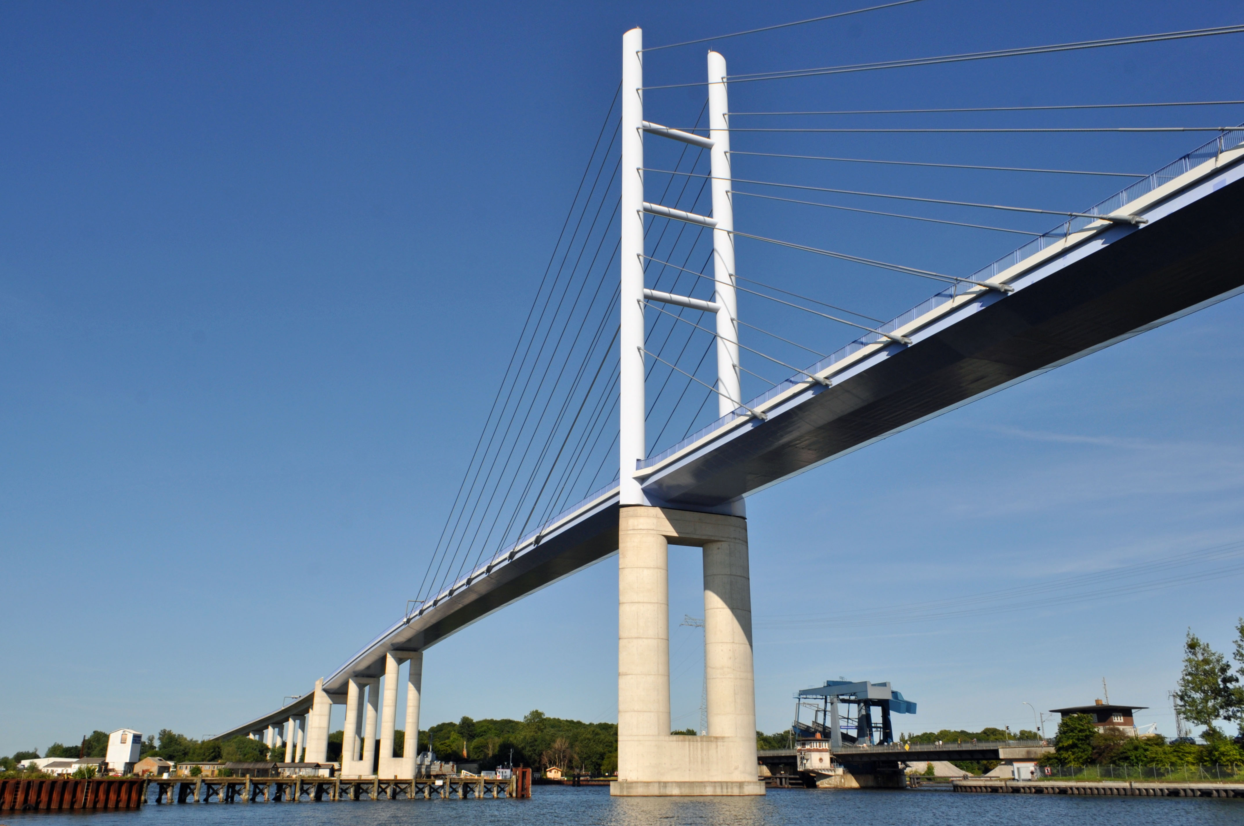 Rügenbrücke Stralsund / Ziegelgrabenbrücke